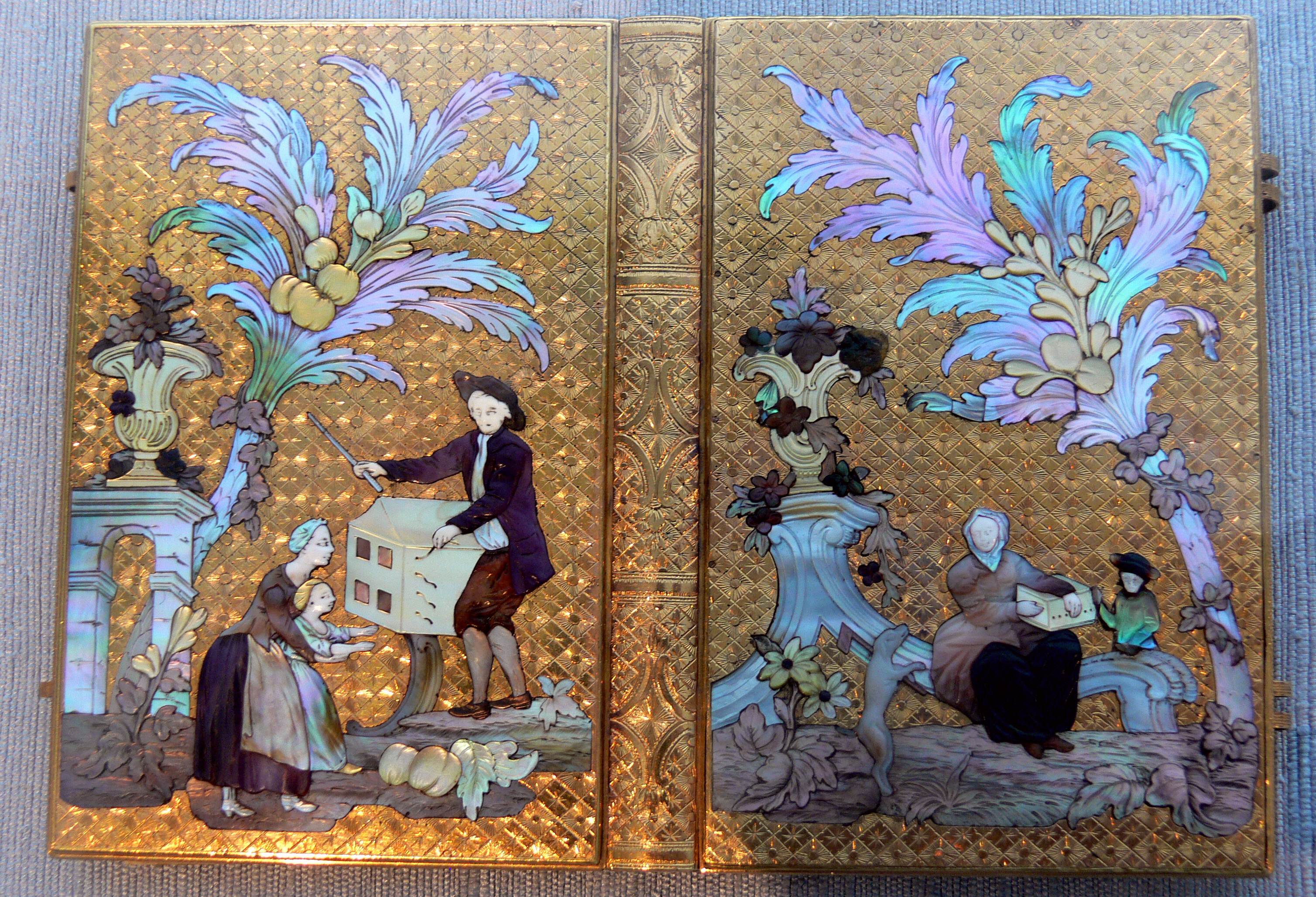 Ballbüchlein; Gold, Perlmutt, Elfenbein, Edelsteine; Pierre Aldebert Griot, Berlin 1750–1760 Kunstgewerbemuseum Berlin, Inv. Nr. 66,142 Motiv: Guckkasten mit vier Einblicken und vier Hebeln, mit denen für jedes Fenster die Bilder weitergedreht werden können; Guckkastenmann mit Zeigestab liefert dazu die Erklärungen. Rechts Leierkastenfrau mit tanzendem Hund und kostümiertem Äffchen. (nach Benutzer:Jossi, Wikipedia-Auskunft, 31. Jan. 2011)